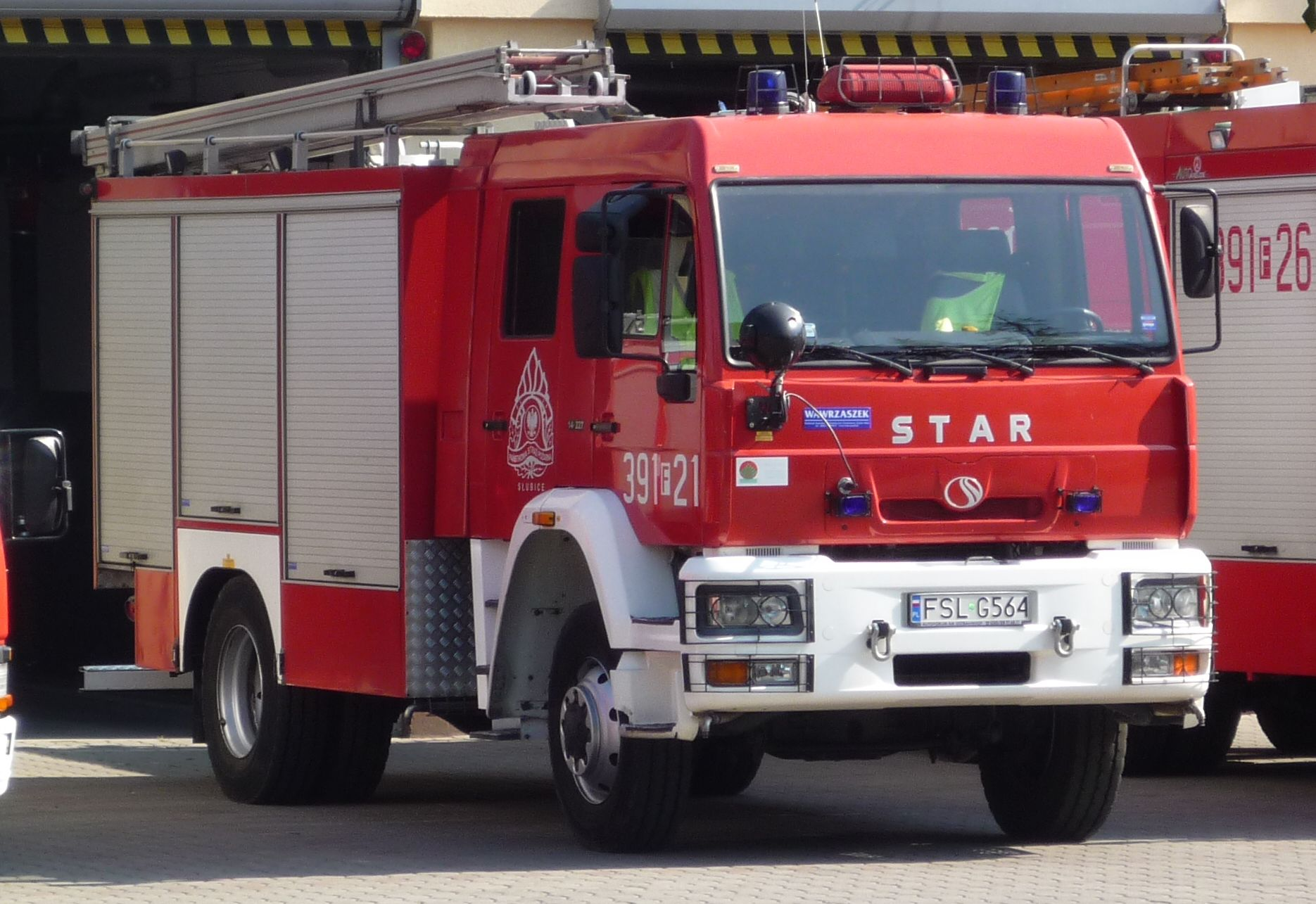 Wóz strażacki słubickiej Państwowej Straży Pożarnej – Star 14-227.